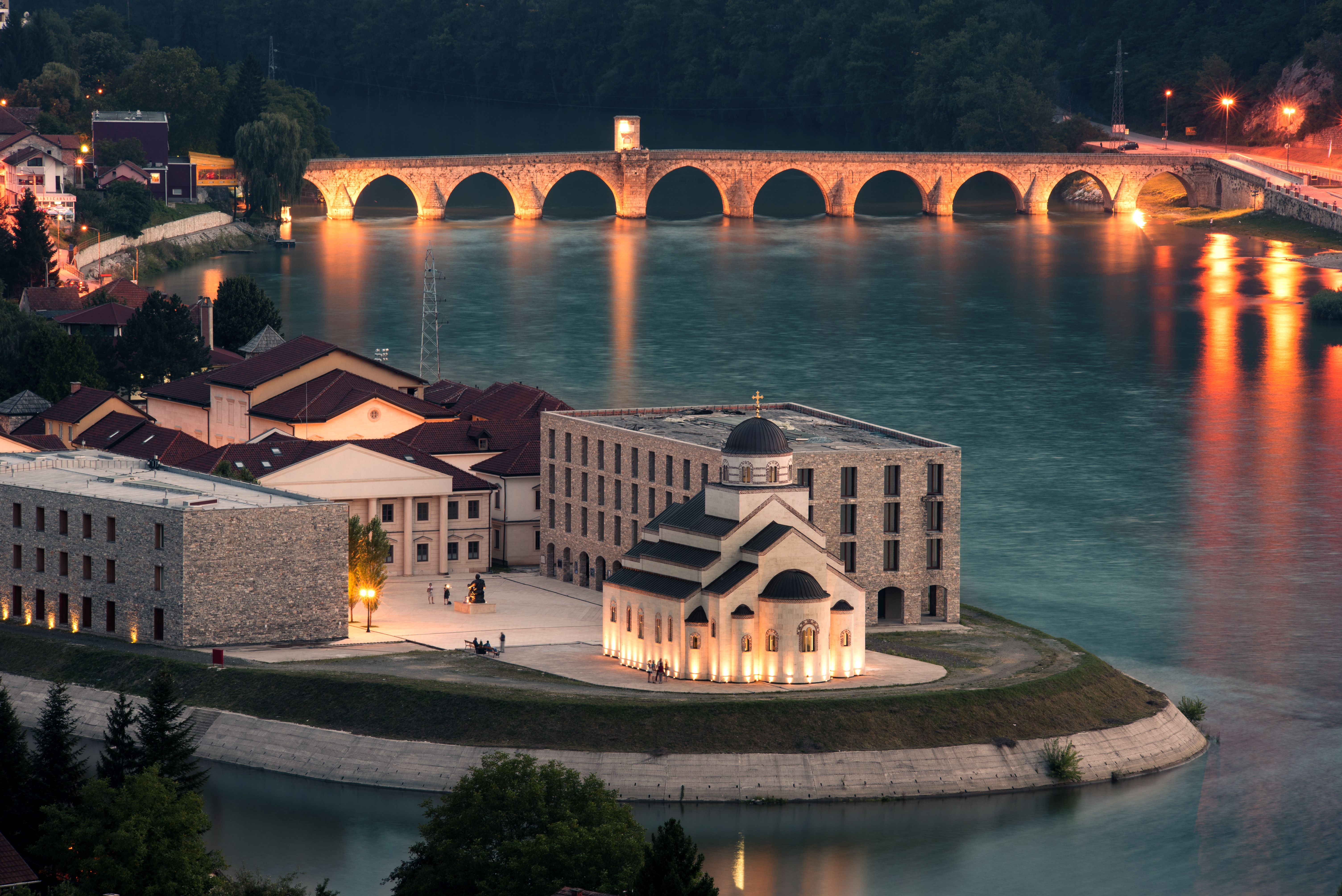 This image was uploaded as part of Trace of Soul 2016.